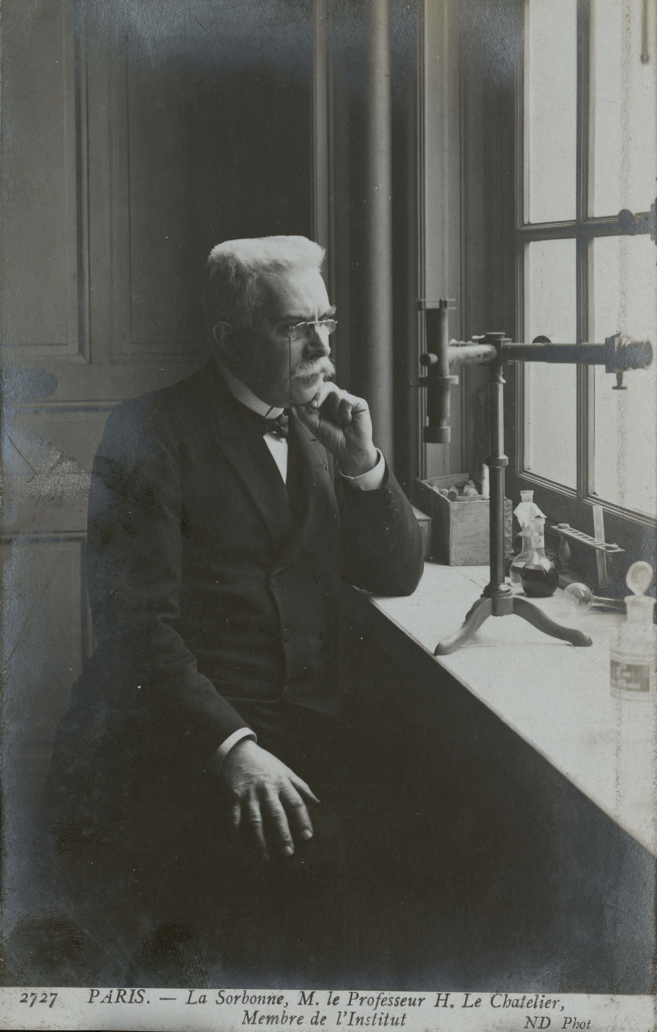 Carte postale photographique